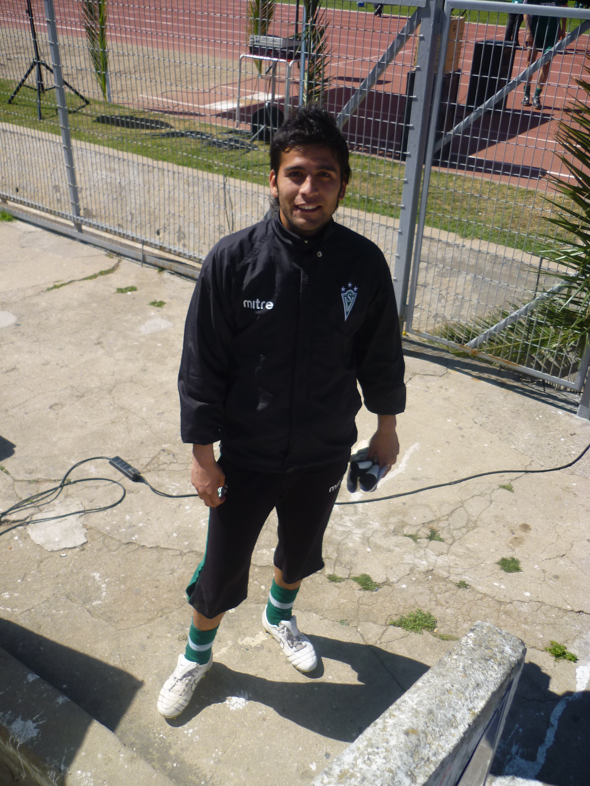 Fotografía de Diego Figueroa, jugador chileno perteneciente al Santiago Wanderers de la Primera División de Chile.